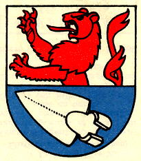 Wappen von Gurmels Kanton Freiburg Schweiz